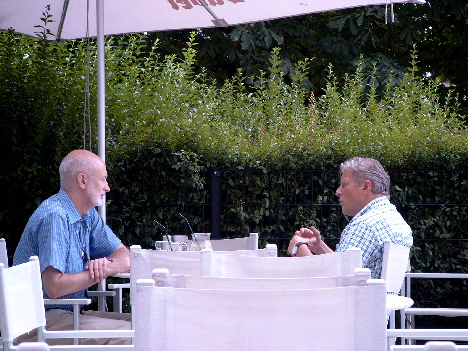 Jan Fabre (rechts) in gesprek